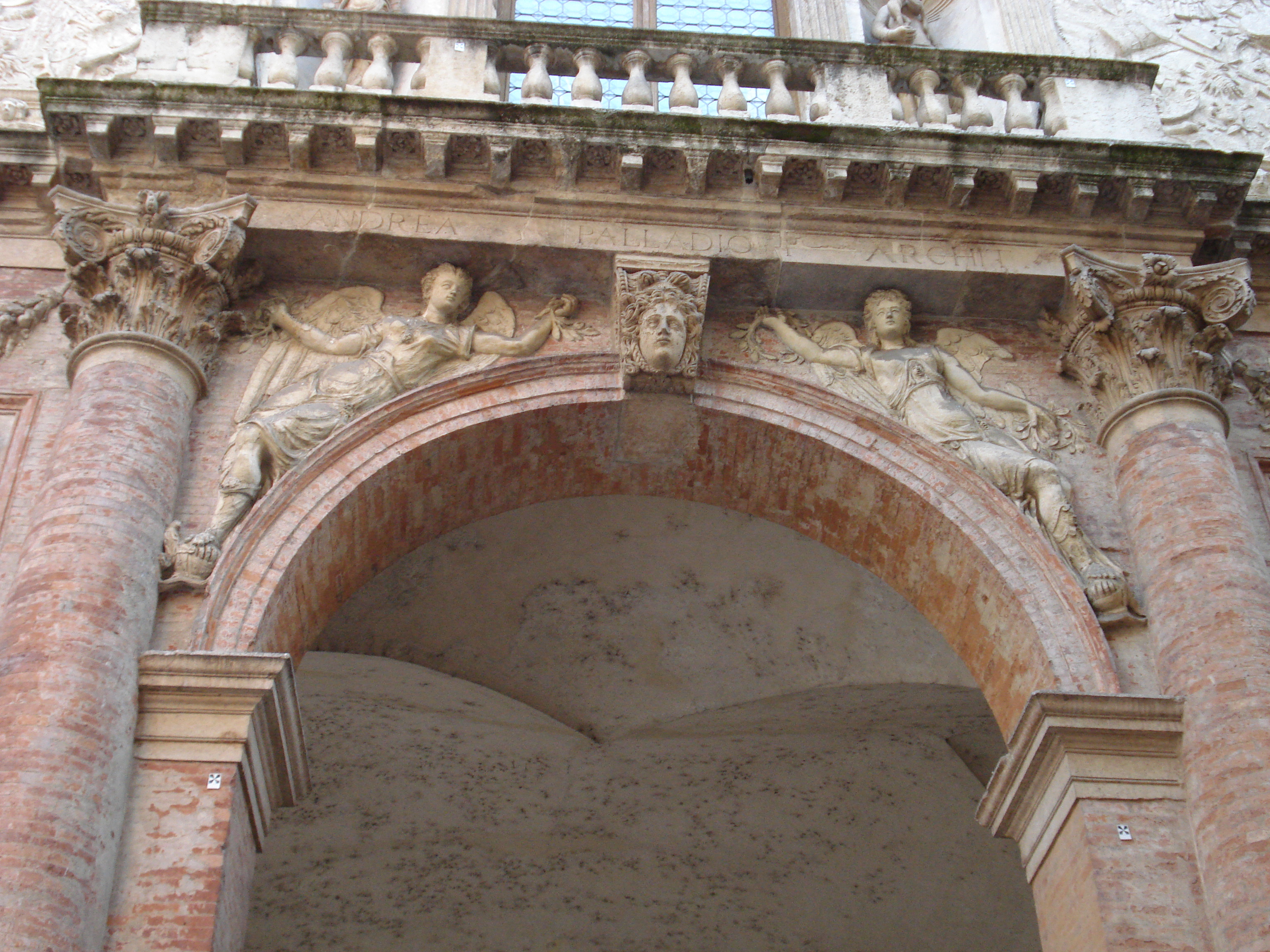 Fregi del portale centrale del palazzo del Capitaniato di Vicenza.